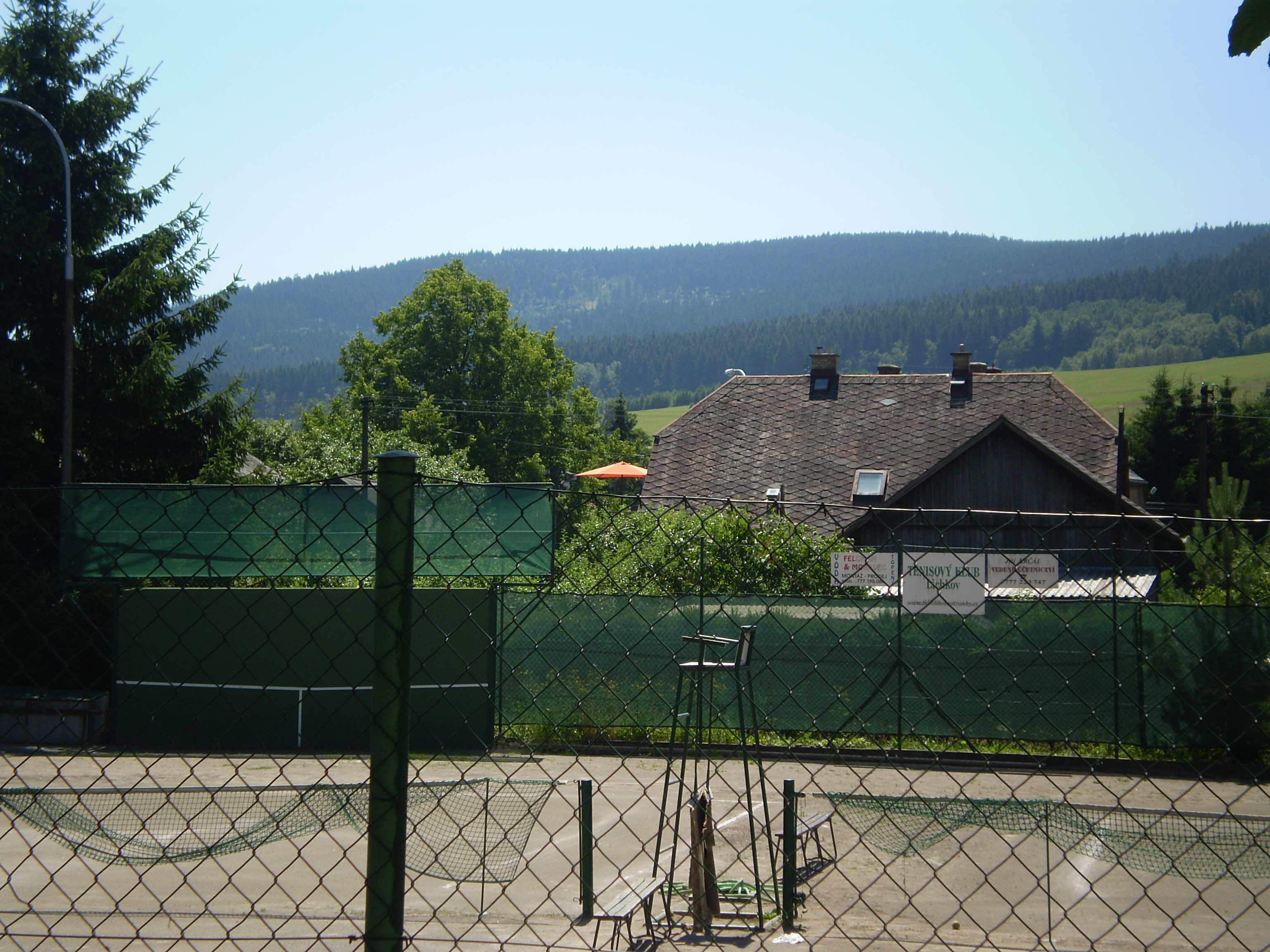 Bouda, Orlické hory